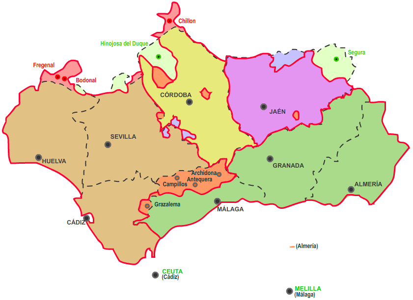 Transformación de los Reinos en Provincias. R.D. 20 noviembre de 1833